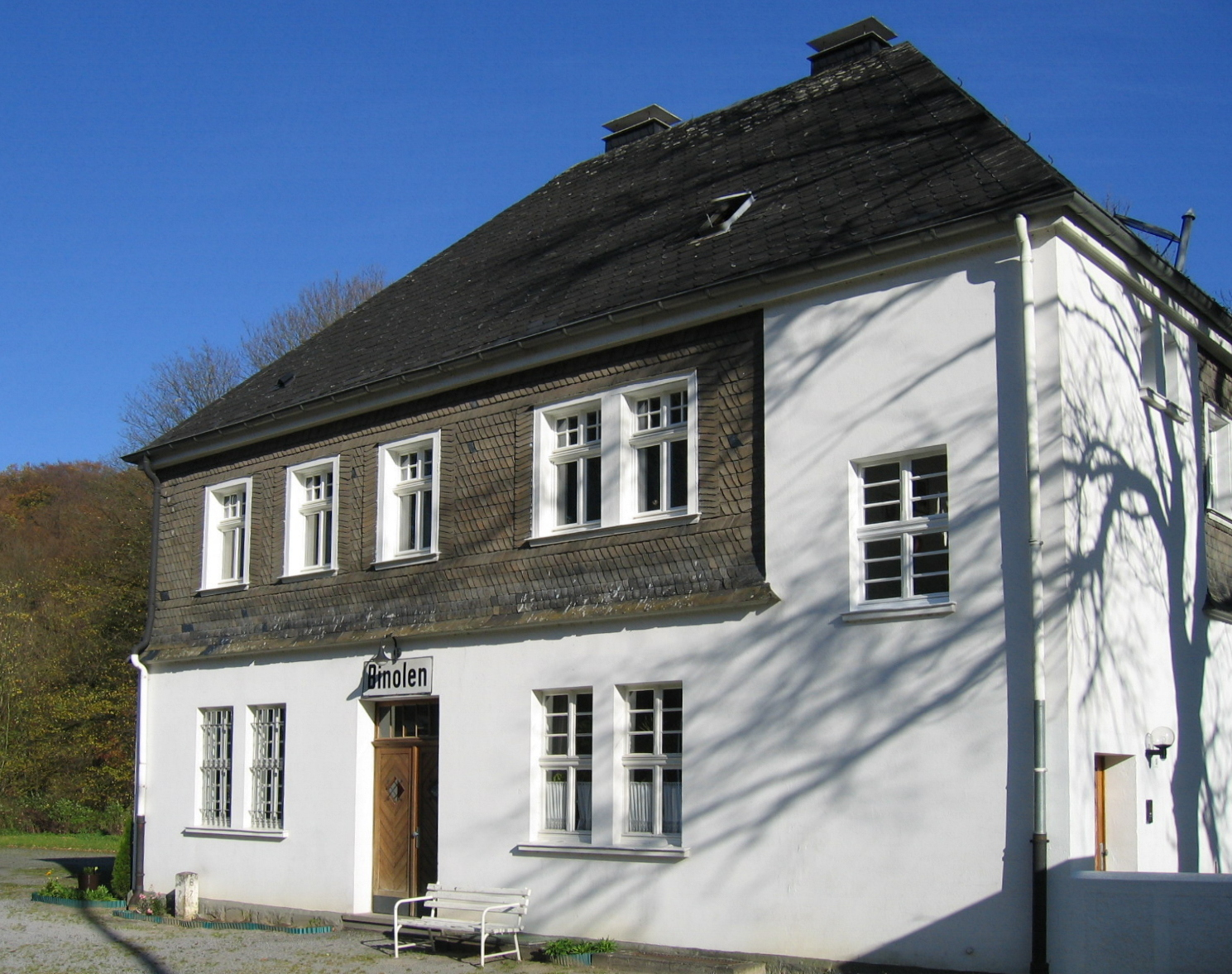 Description: Ehemaliges Bahnhofsgebäude am Haltepunkt Binolen der Hönnetalbahn in Balve Source: selbst fotografiert Date: 31. Okt. 2005 Author: Bubo